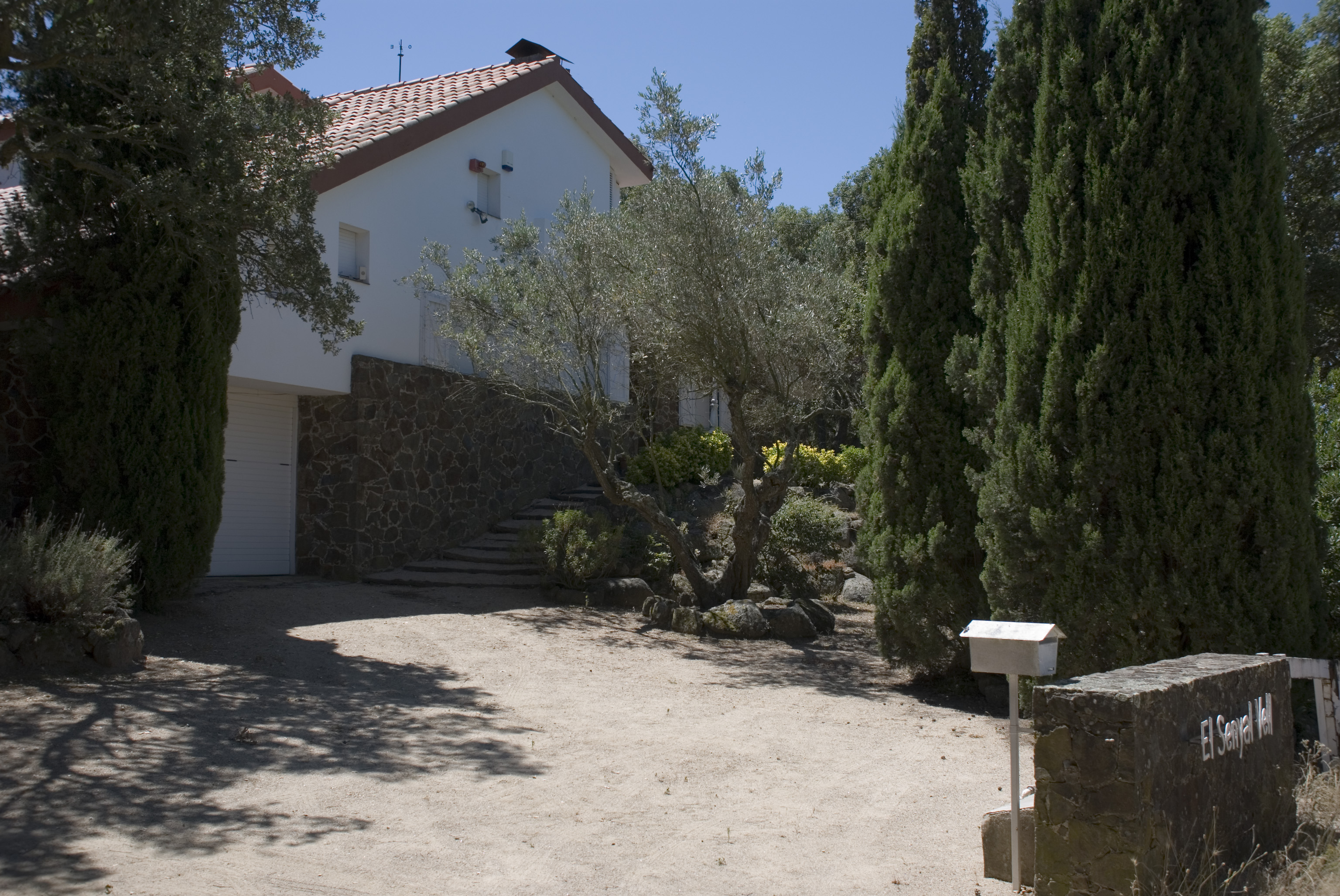 Fotografia del xalet El Senyal Vell de Mercè Rodoreda a Romanyà de la Selva, CT. Camera data Camera Nikon D80 Lens Nikon AF-S DX 18-135 mm Focal length 24 mm Aperture f/3.8 Exposure time 500 s Sensivity ISO 100